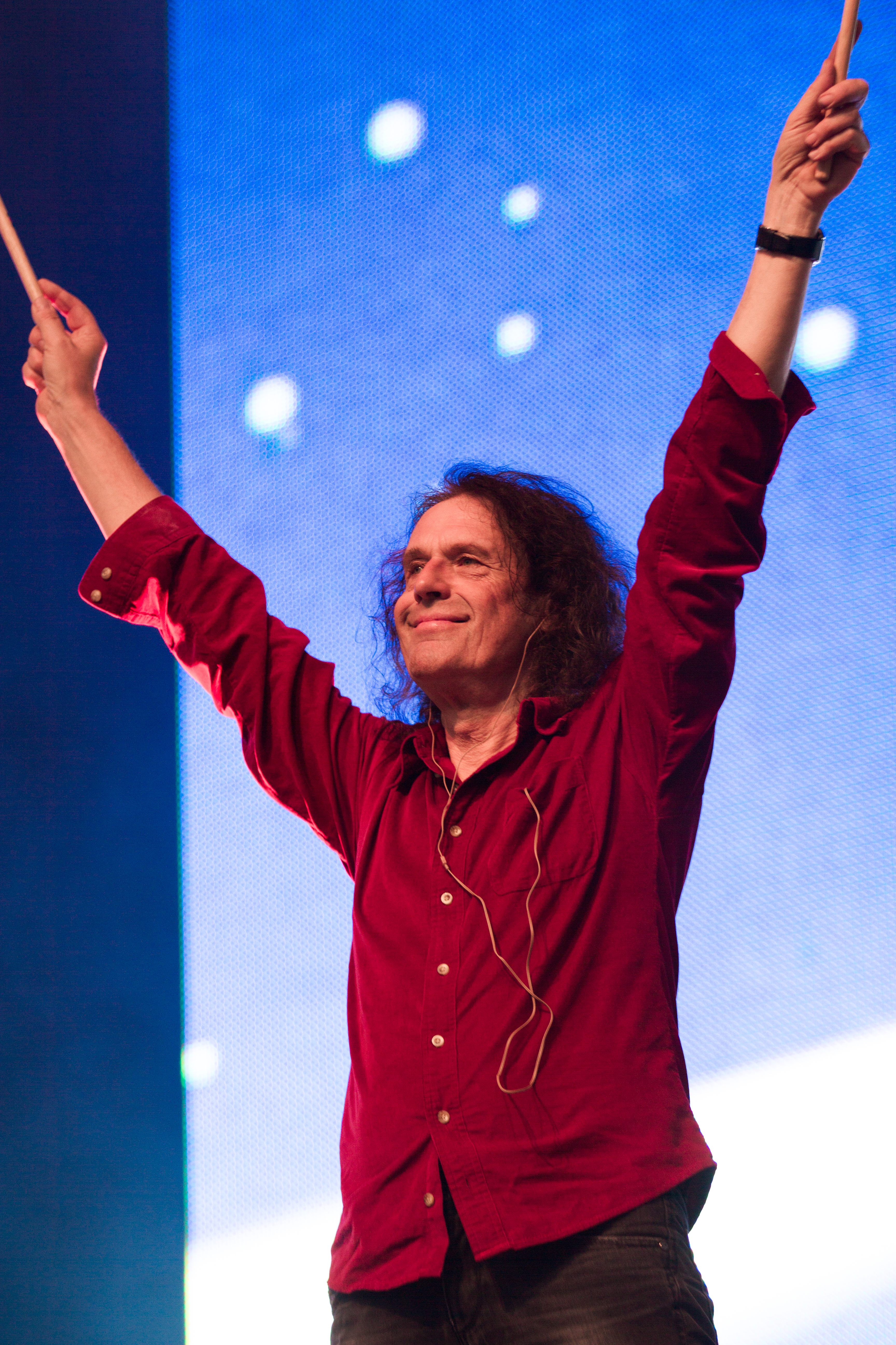 Michael Schwandt von Karat beim "Karat 40 Jahre KARAT - Das EINZIGE Jubiläumskonzert" in der Berliner Waldbühne am 20.06.2015